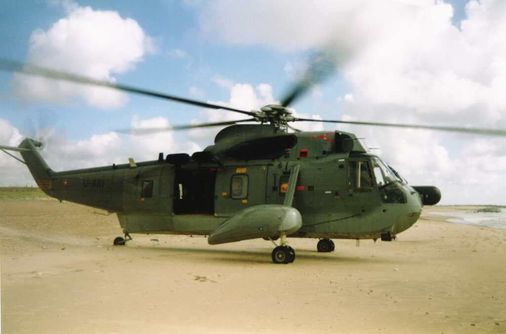 Hubschrauber der dänischen Marine während eines Badeunfalls am dänischen Nordseestrand